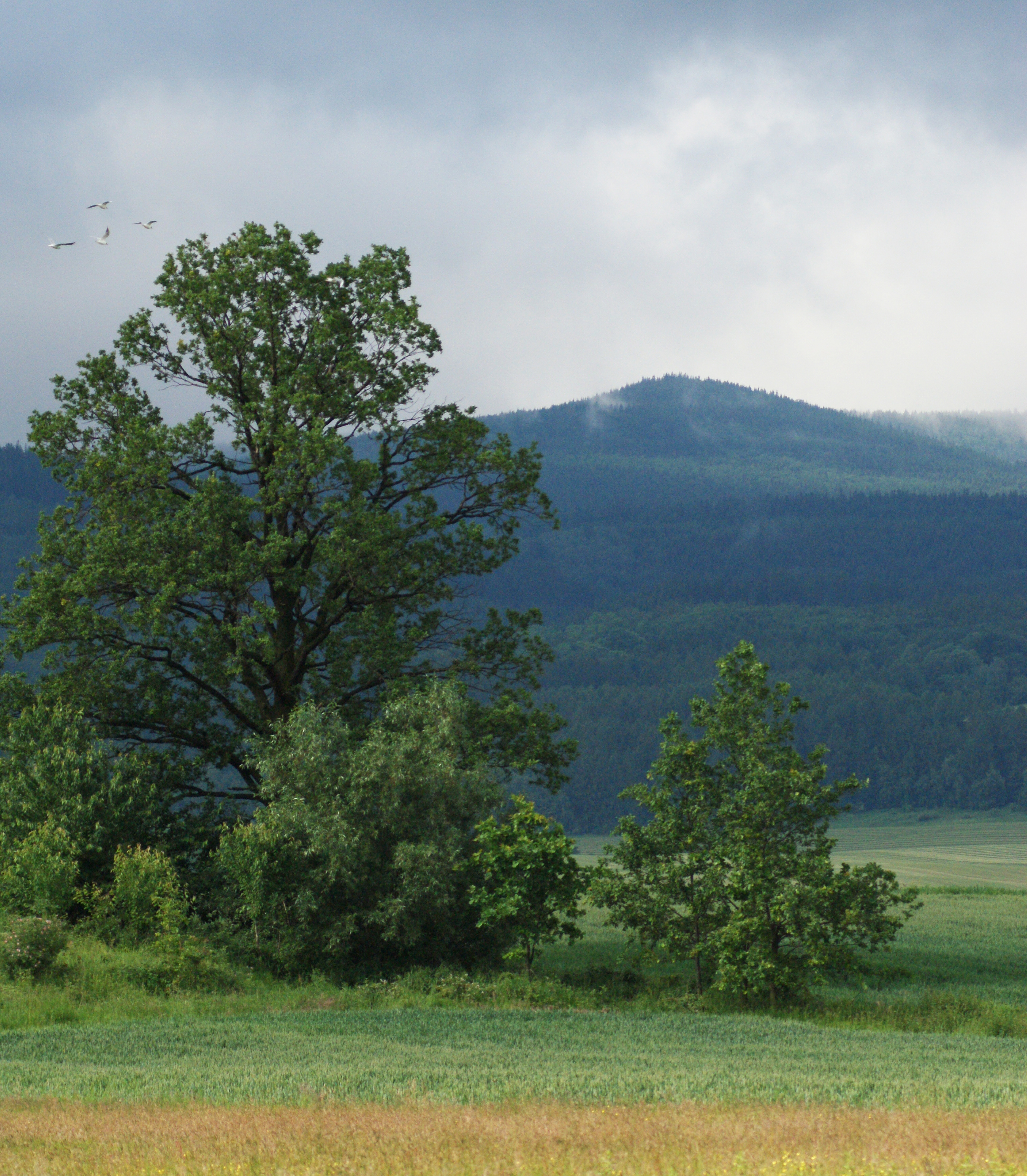 Borówkowa - widok z Kamienicy